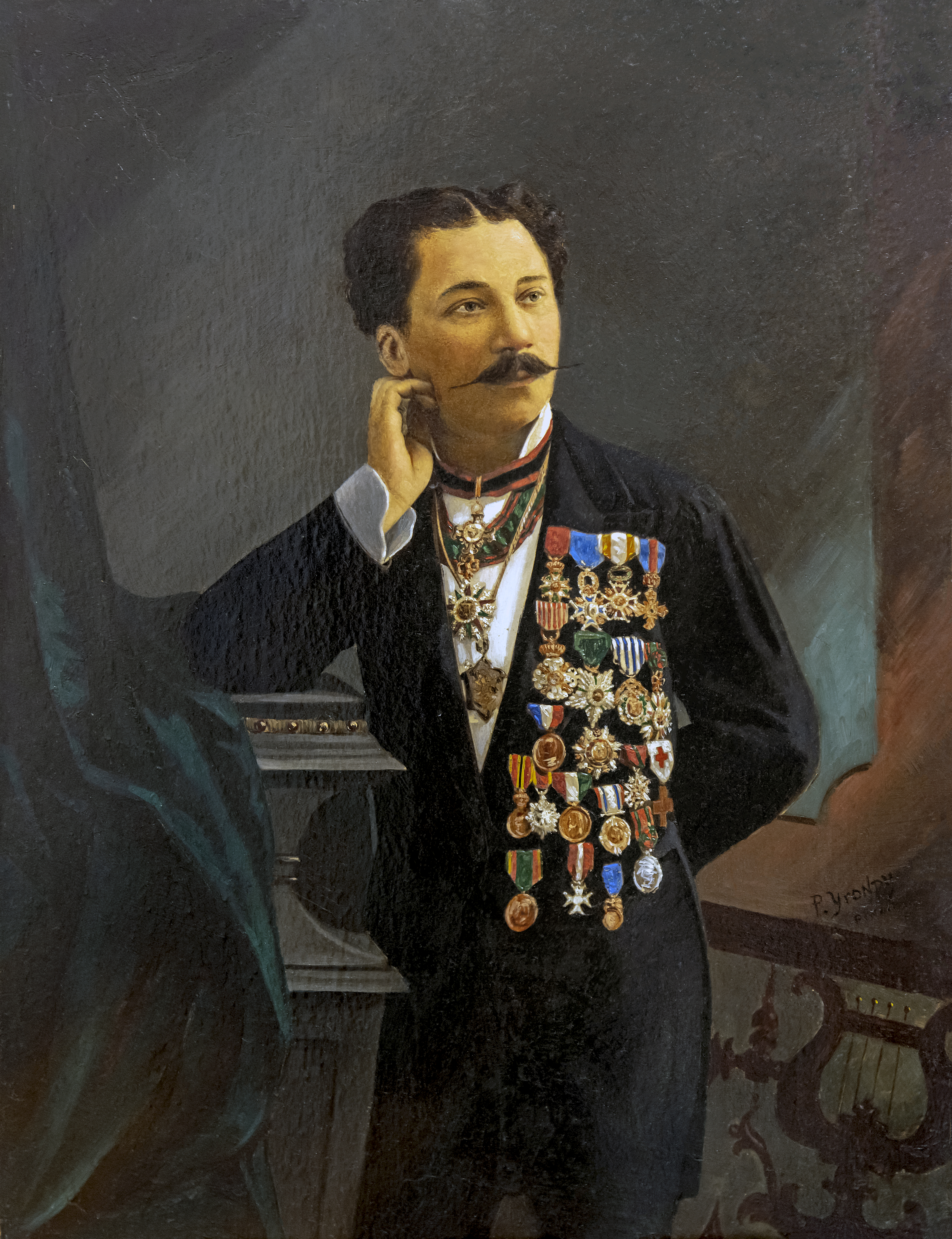 Depicted person: Marius Cazeneuve